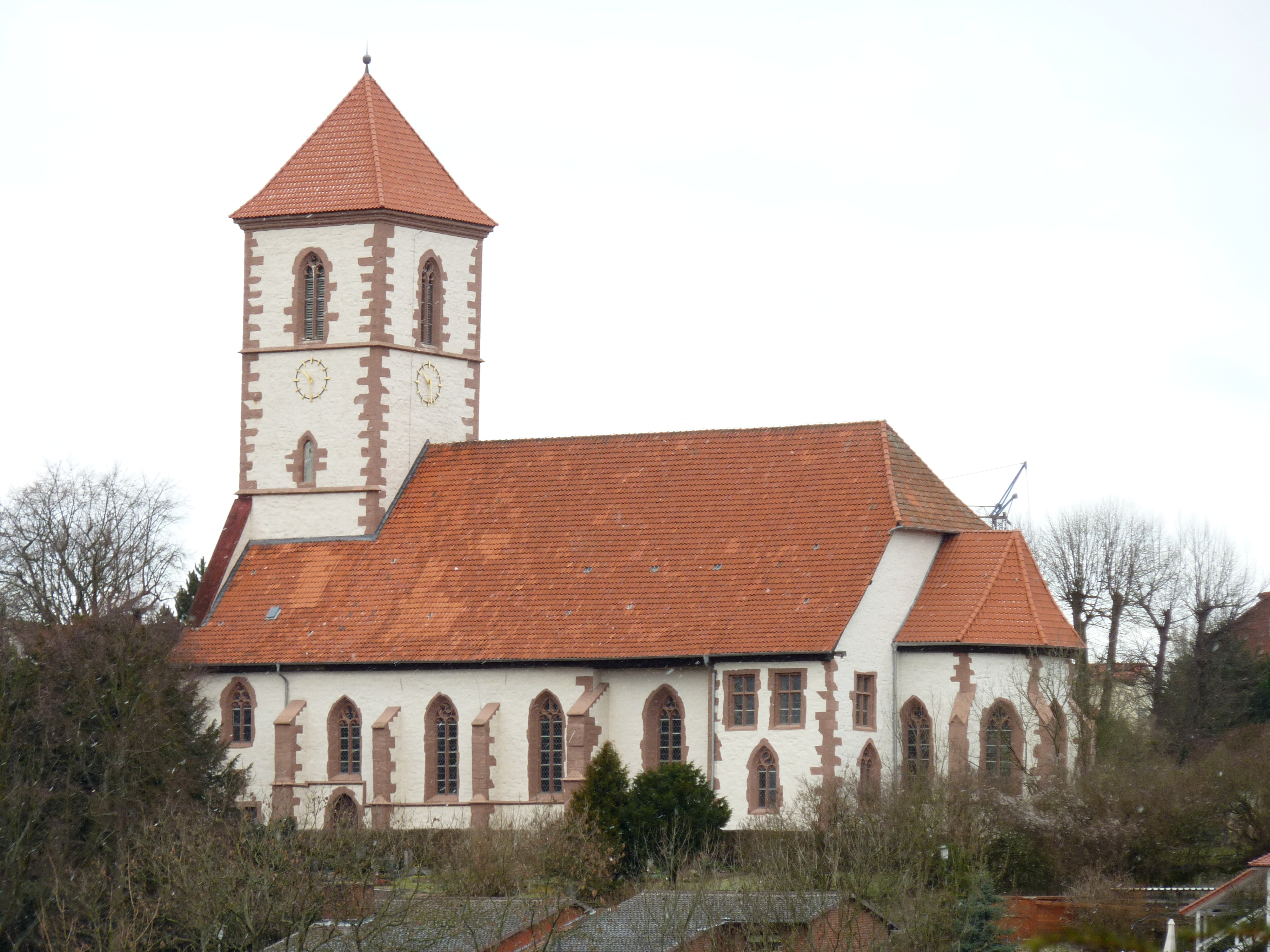 Klosterkirche Nikolausberg, Stadt Göttingen. Im Kern romanisch (erhaltenes ehem. Querschiff der romanischen Basilika Mitte 12. Jahrhundert) mit vielfachen Änderungen und Ergänzungen im 14., 15. und frühen 16. Jahrhundert. Blick auf die Kirche vom gegenüberliegenden Hang des Feldbornbergs bei leichtem Schneefall